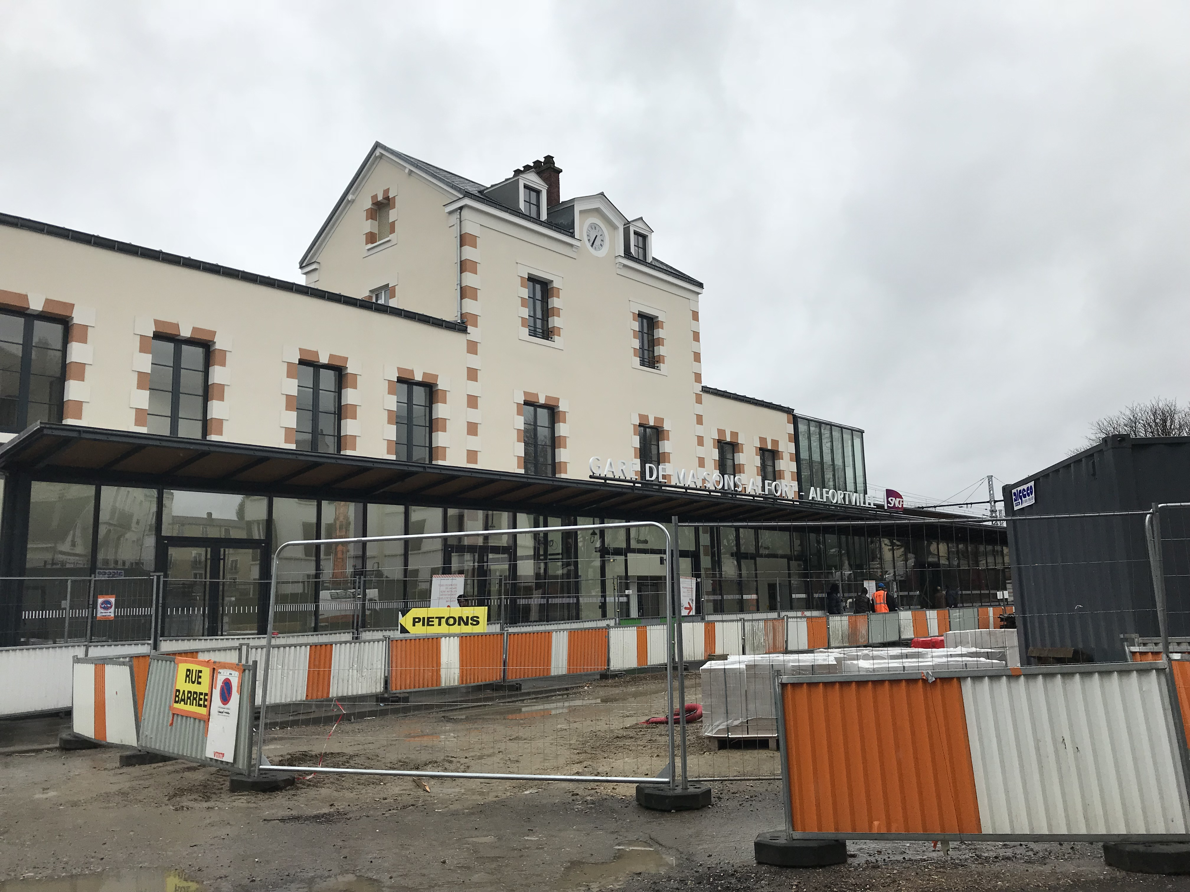 Gare de Maison-Alfort - Alfortville en 2018